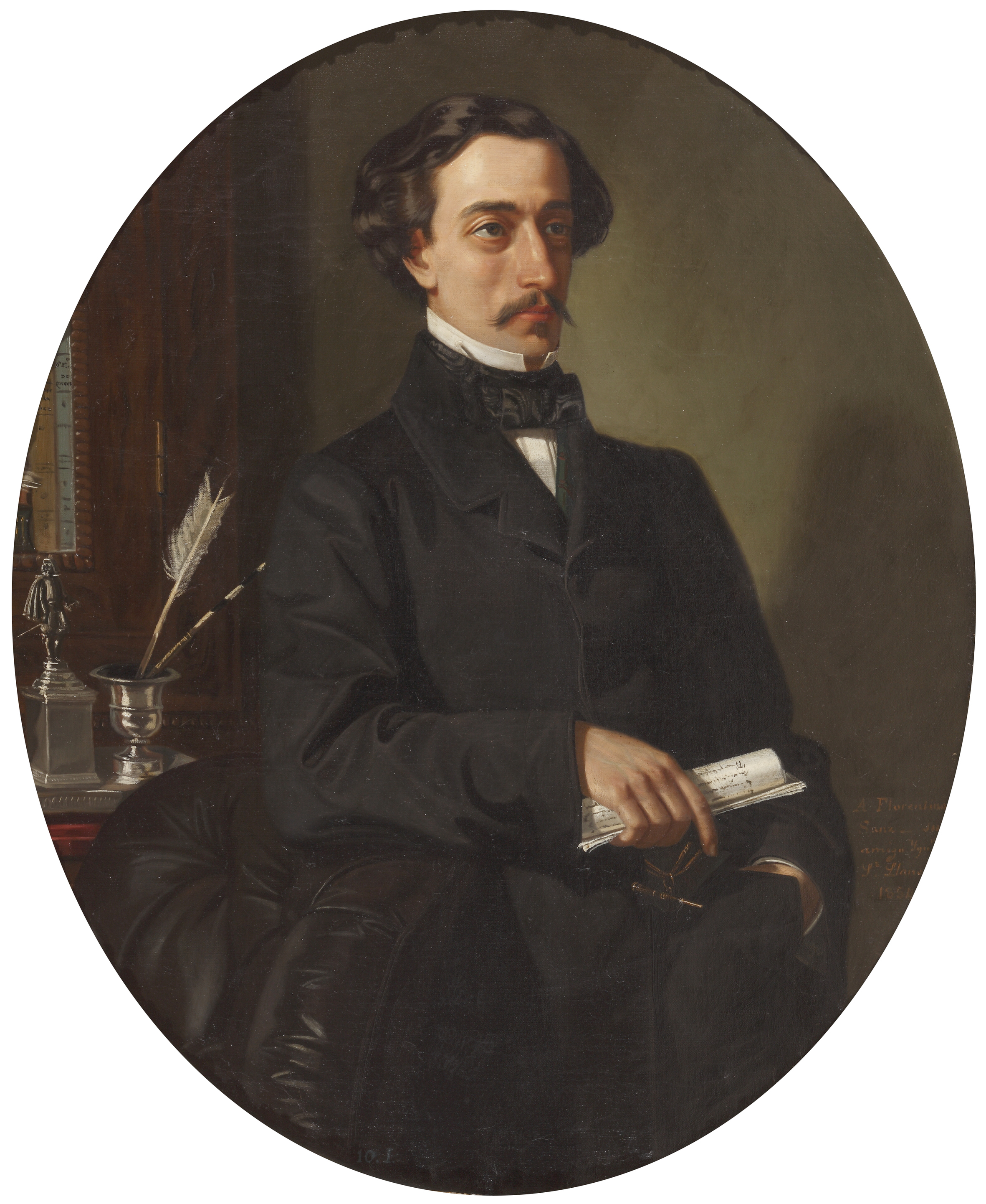 Retrato del escritor, politico y diplomático español Eulogio Florentino Sanz (1822-1881).